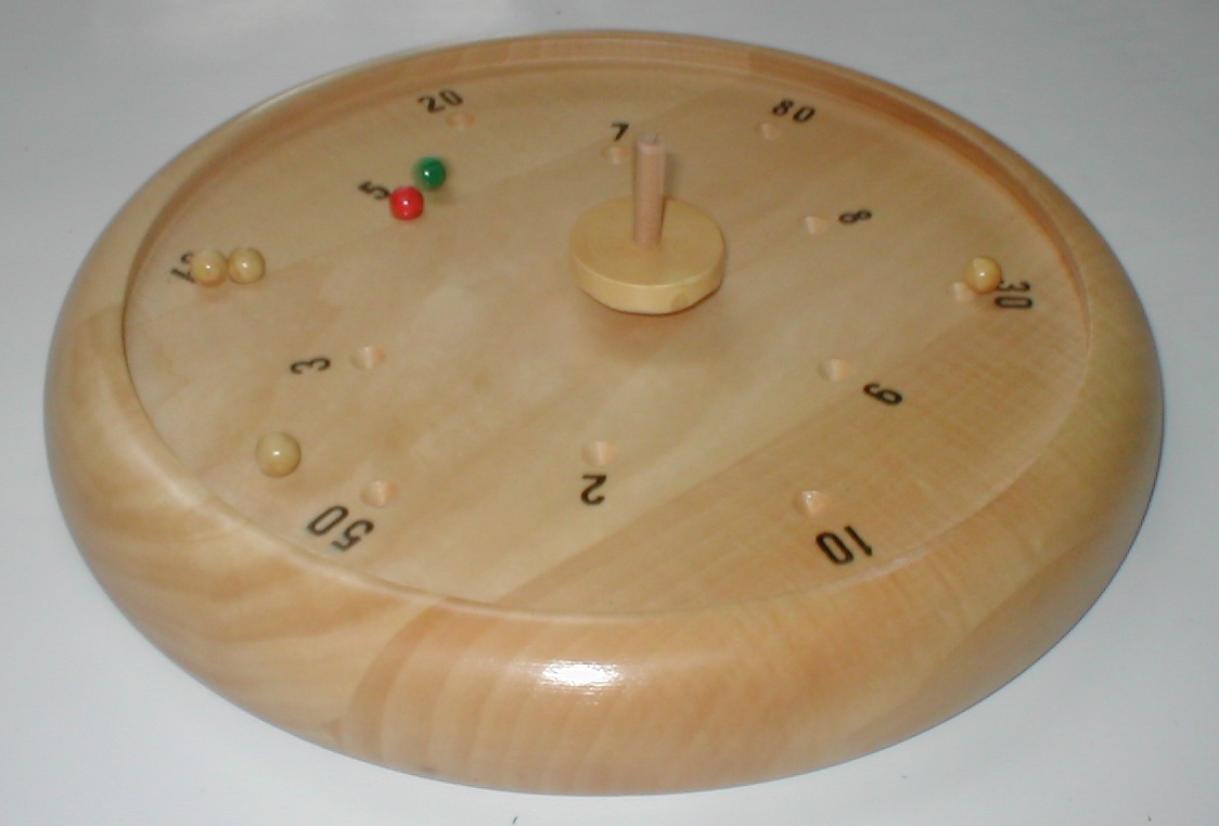 Le « Virolon » (ou « Giroulette » ou encore « Toupie Tyrolienne »), est un jeu de de hasard avec une toupie, de petites billes et un plateau en bois avec des trous de valeurs différentes. Ses origines remontent au 19e siècle en Autriche [1].